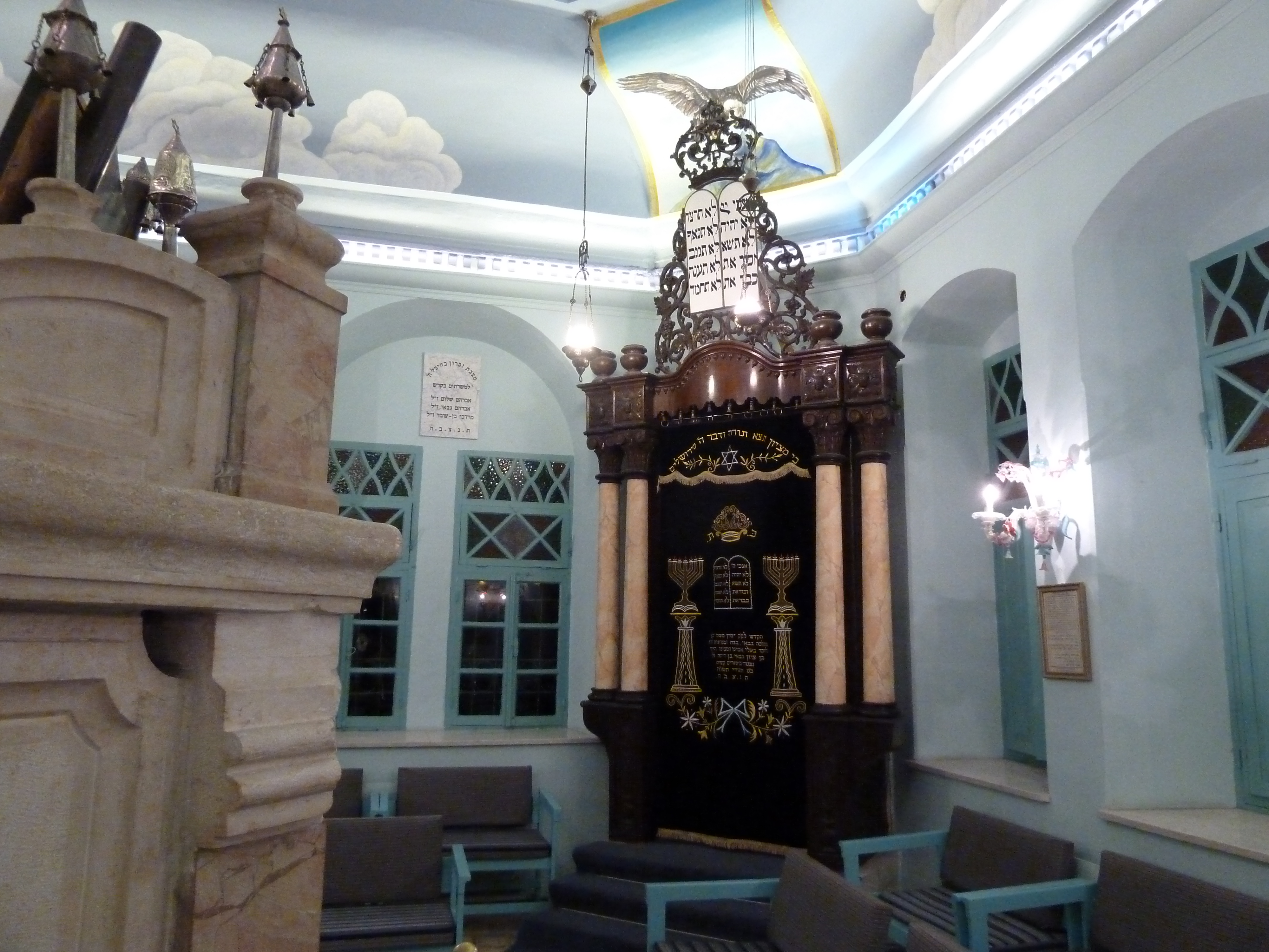 בית הכנסת הספרדי הגדול הוא בית כנסת בנוסח ספרד הממוקם ברחוב מלכי פינת רחוב ימין משה בשכונת ימין משה בירושלים. מאופיין בעיצוב פנים ייחודי ומפואר, ויטראז'ים , איורי תקרה ונברשות זכוכית מורנו.